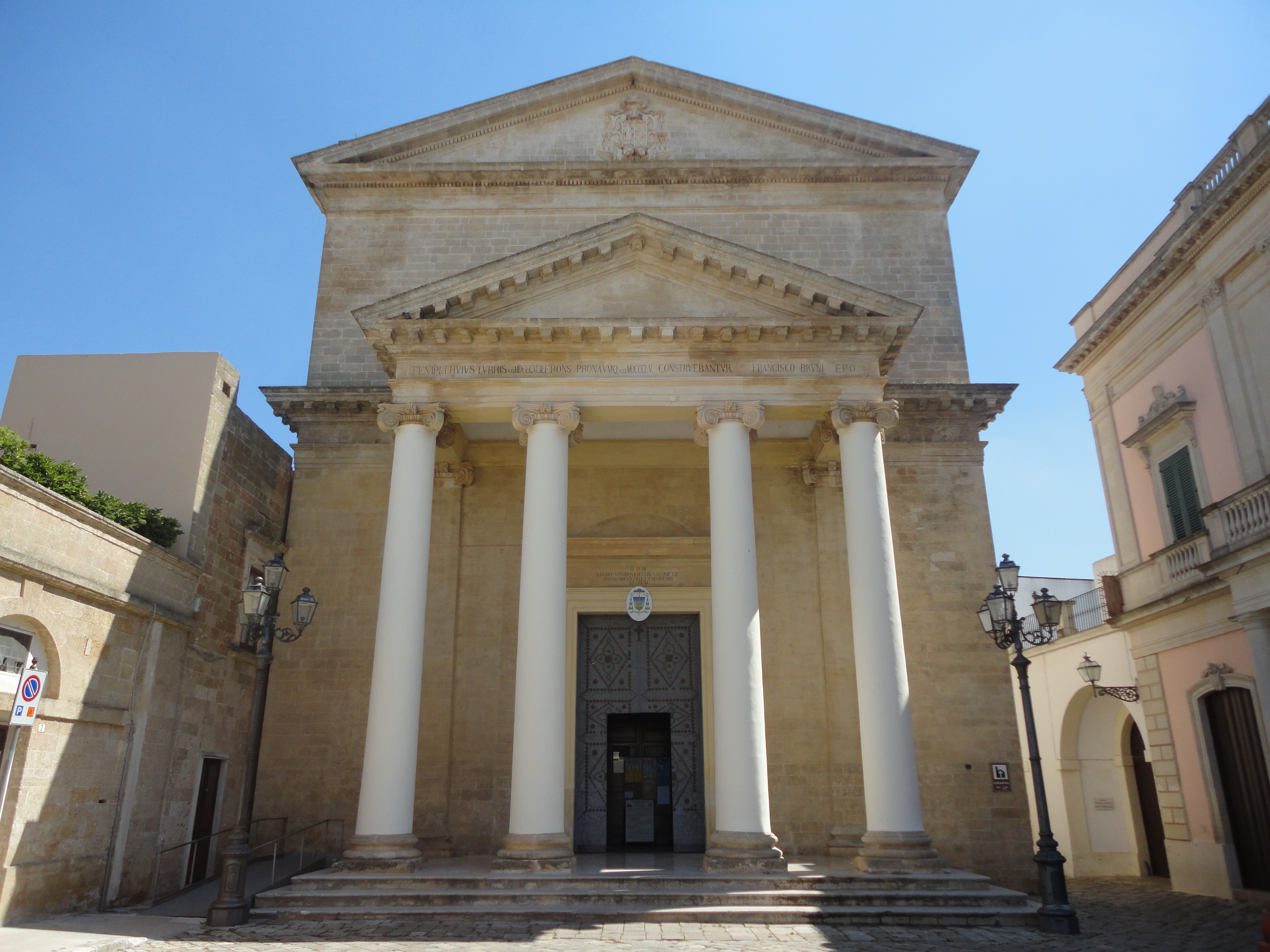 Cattedrale di Ugento, Lecce